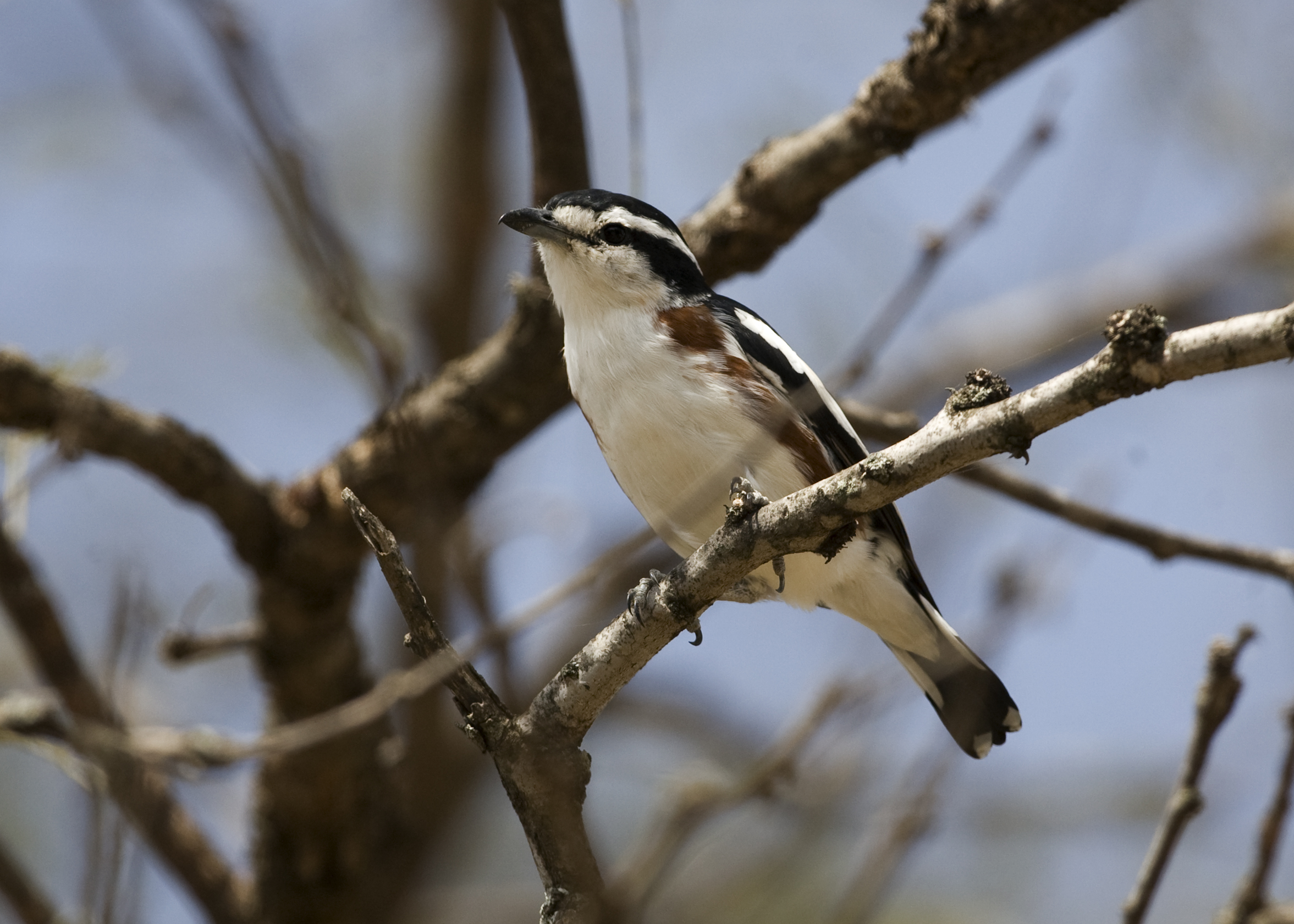 Brubru